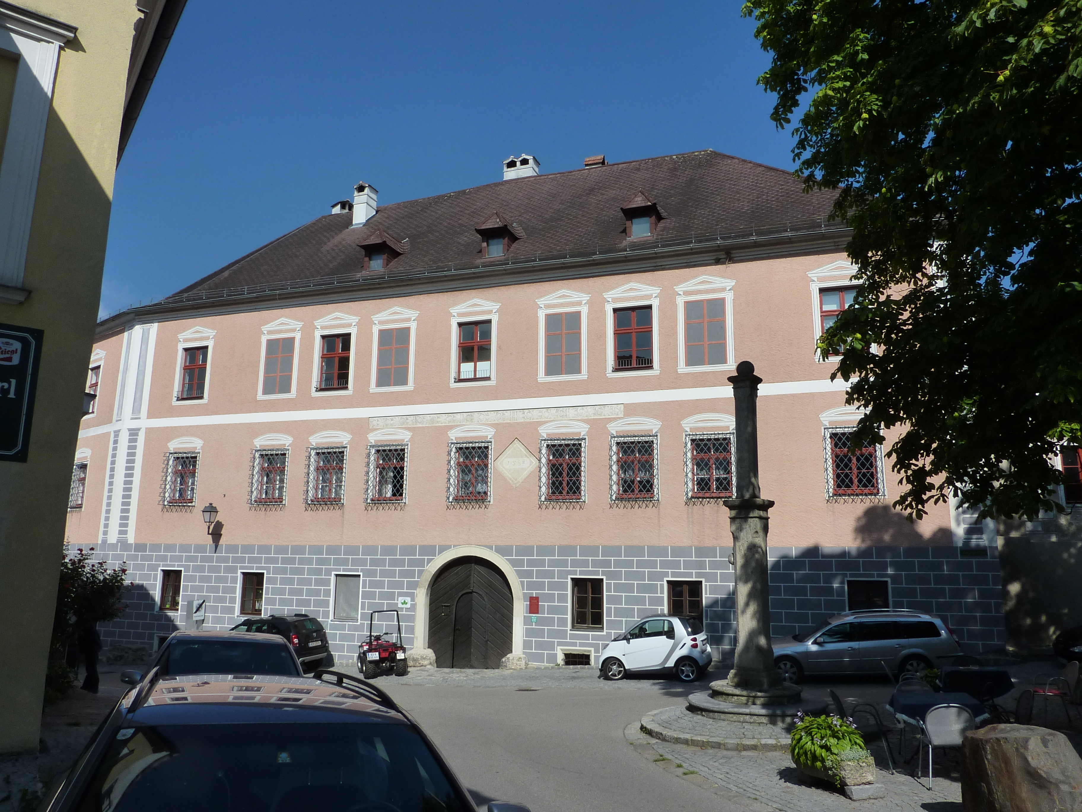 Schloss, Rossatz 74, Niederösterreich